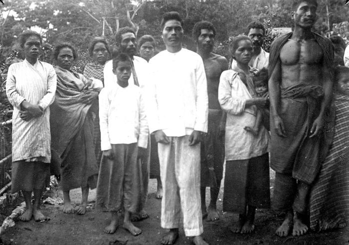 Repronegatief. Tot het Christendom bekeerde bewoners van Fakal, Zuid-Boeroe